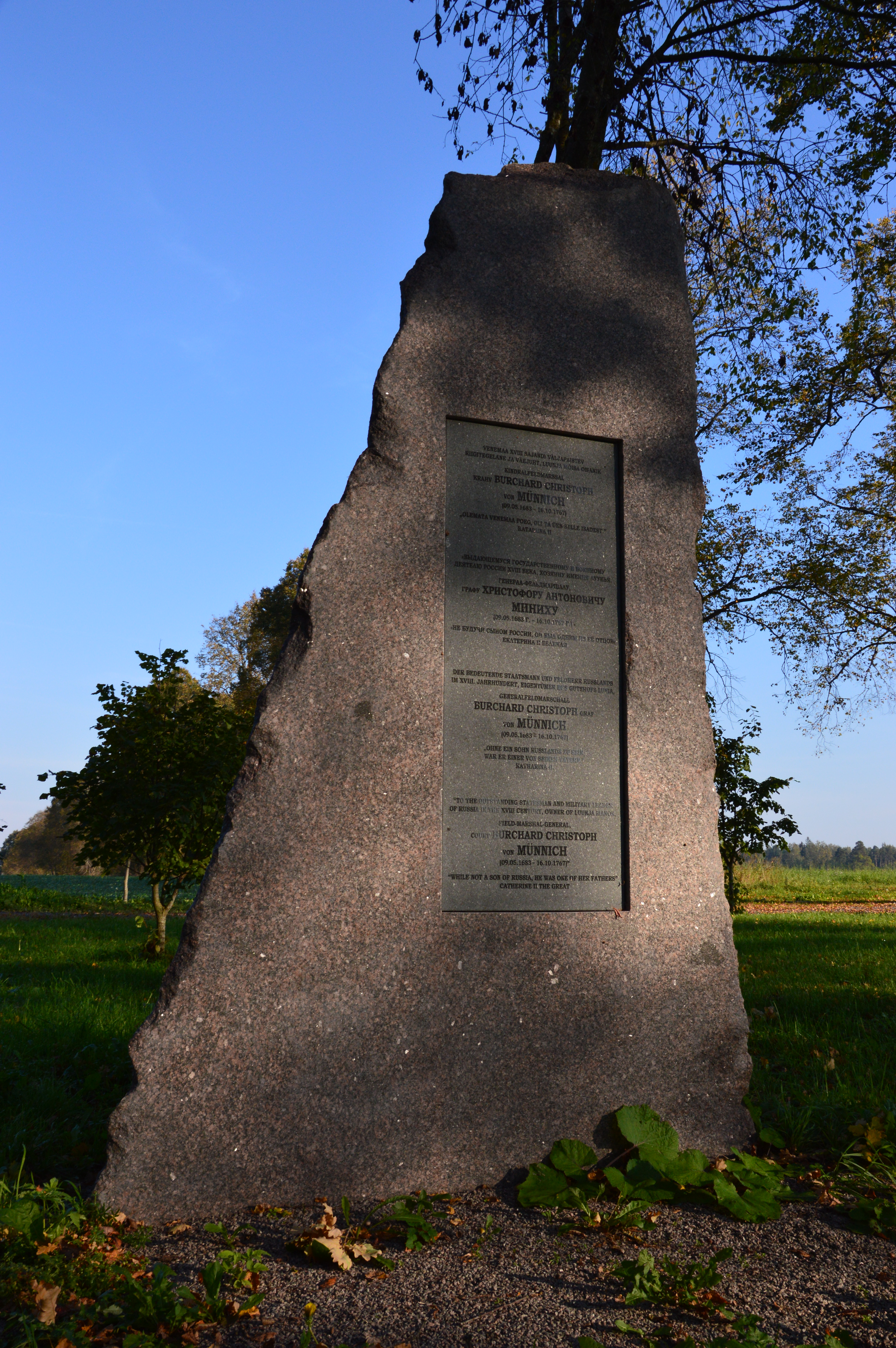 Luunja mõisa kalmistu